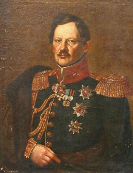 Степан Степанович Стрекалов (1782—1856)